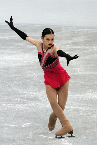 Ванесса Лам (США) на чемпионате мира по фигурному катанию среди юниоров 2012